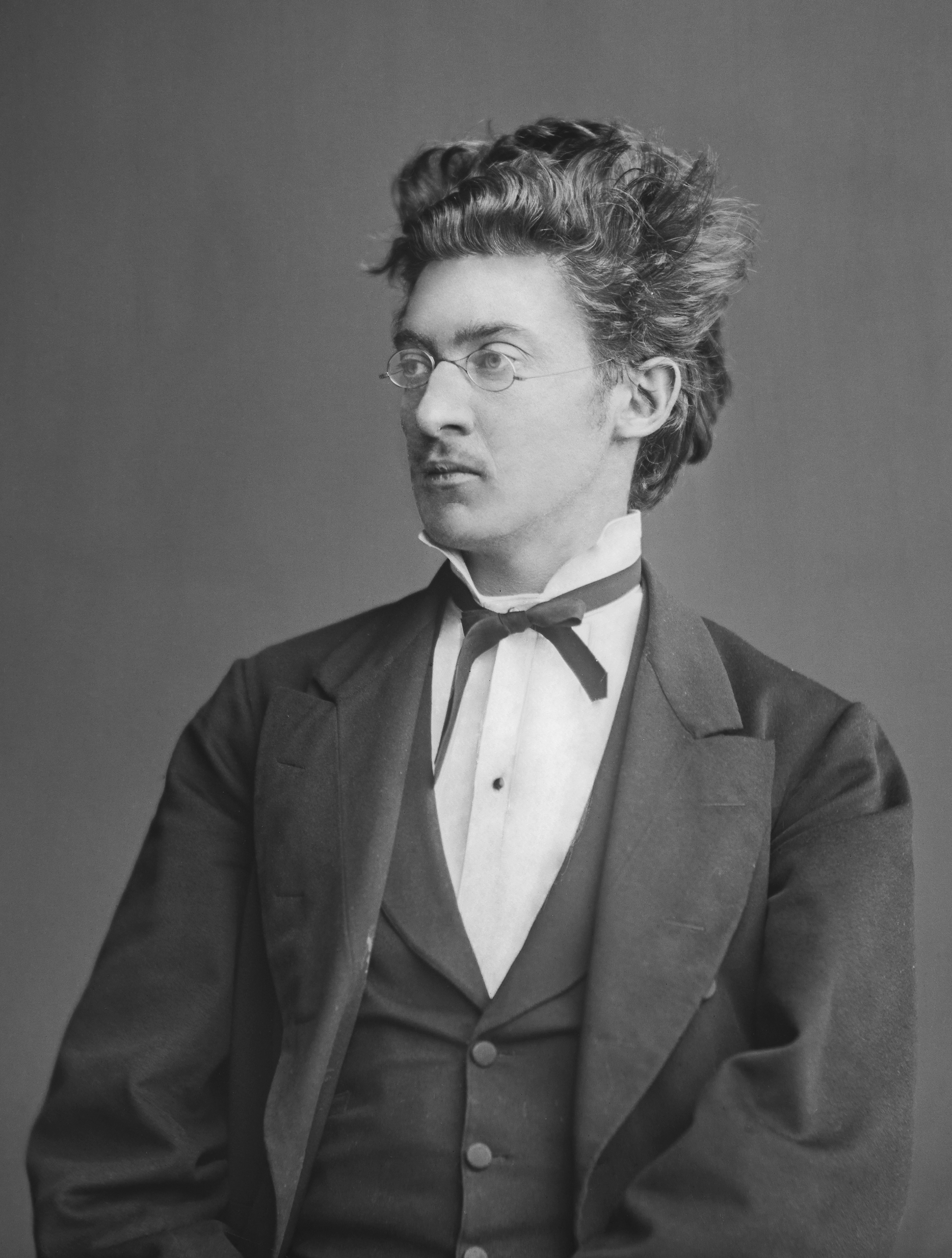 Herman Vendell (1853-1907)